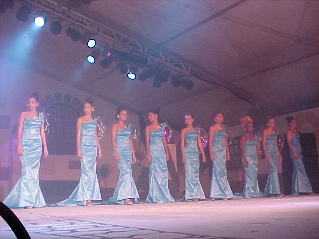 Gala reina 2000